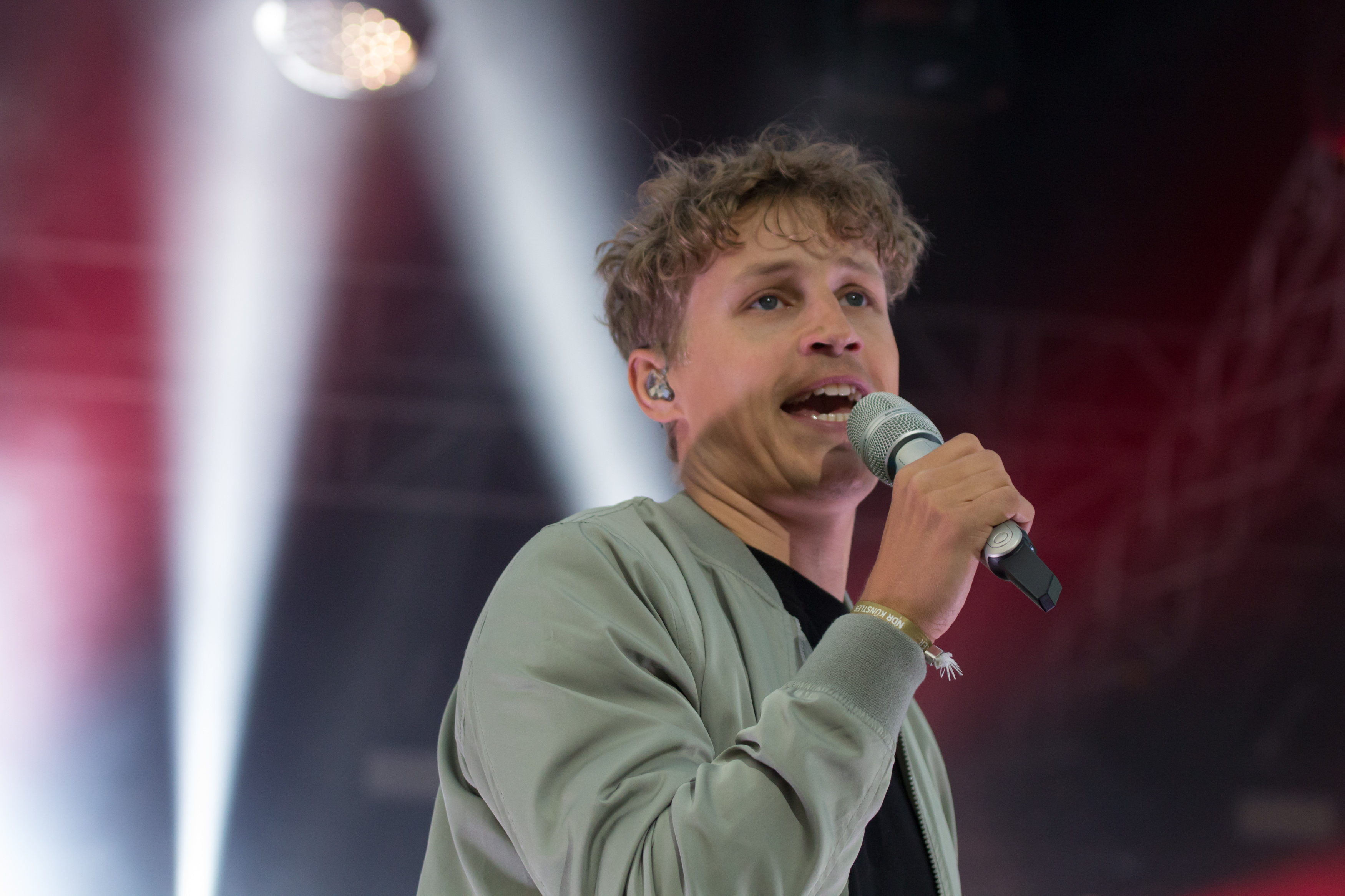 Auf der NDR-Bühne während der Kieler Woche 2018